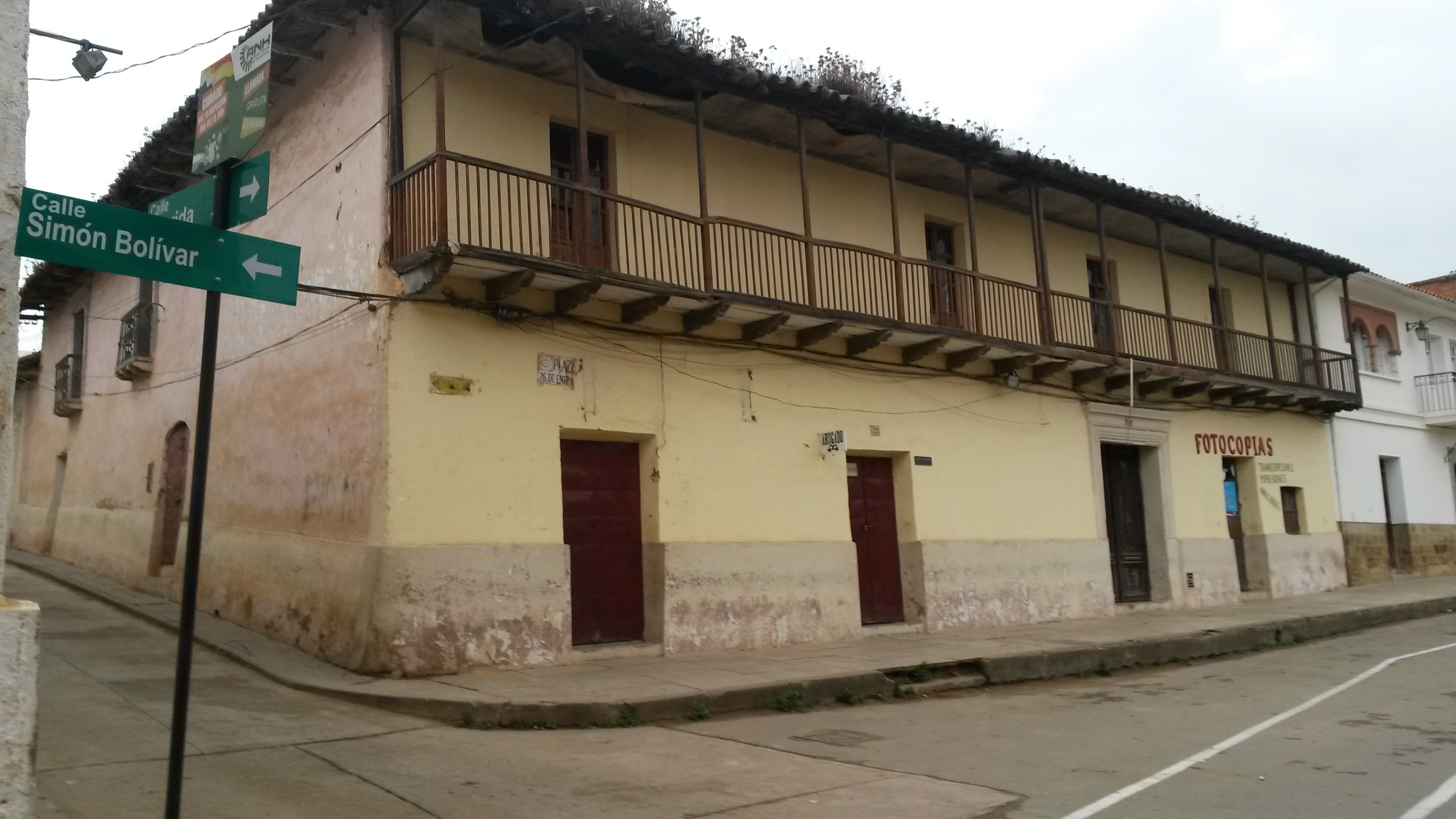 fotografia de una de las casonas mas antiguas de vallegrande